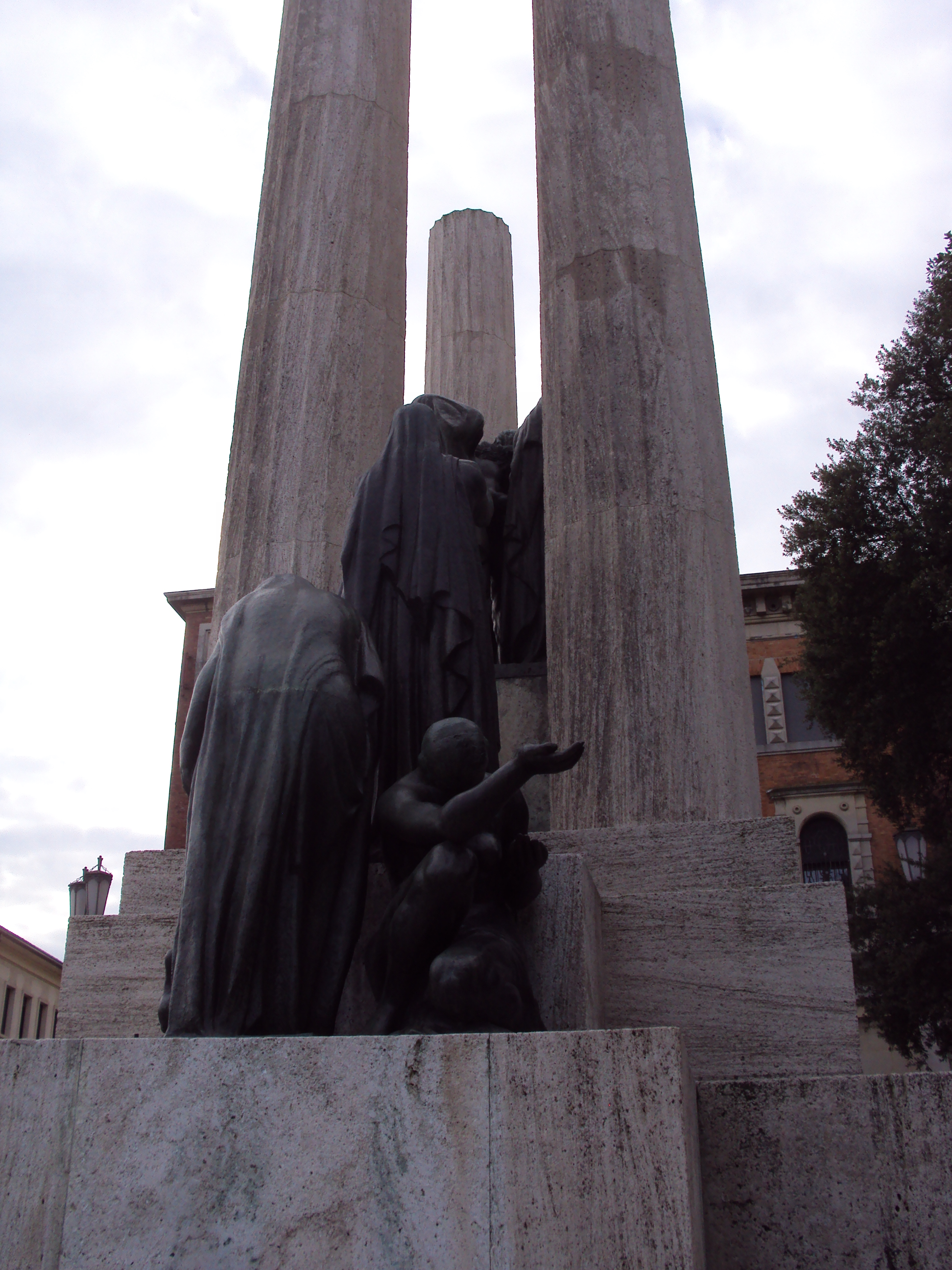 Veduta laterale monumento - donne addolorate che accompagnano il corteo